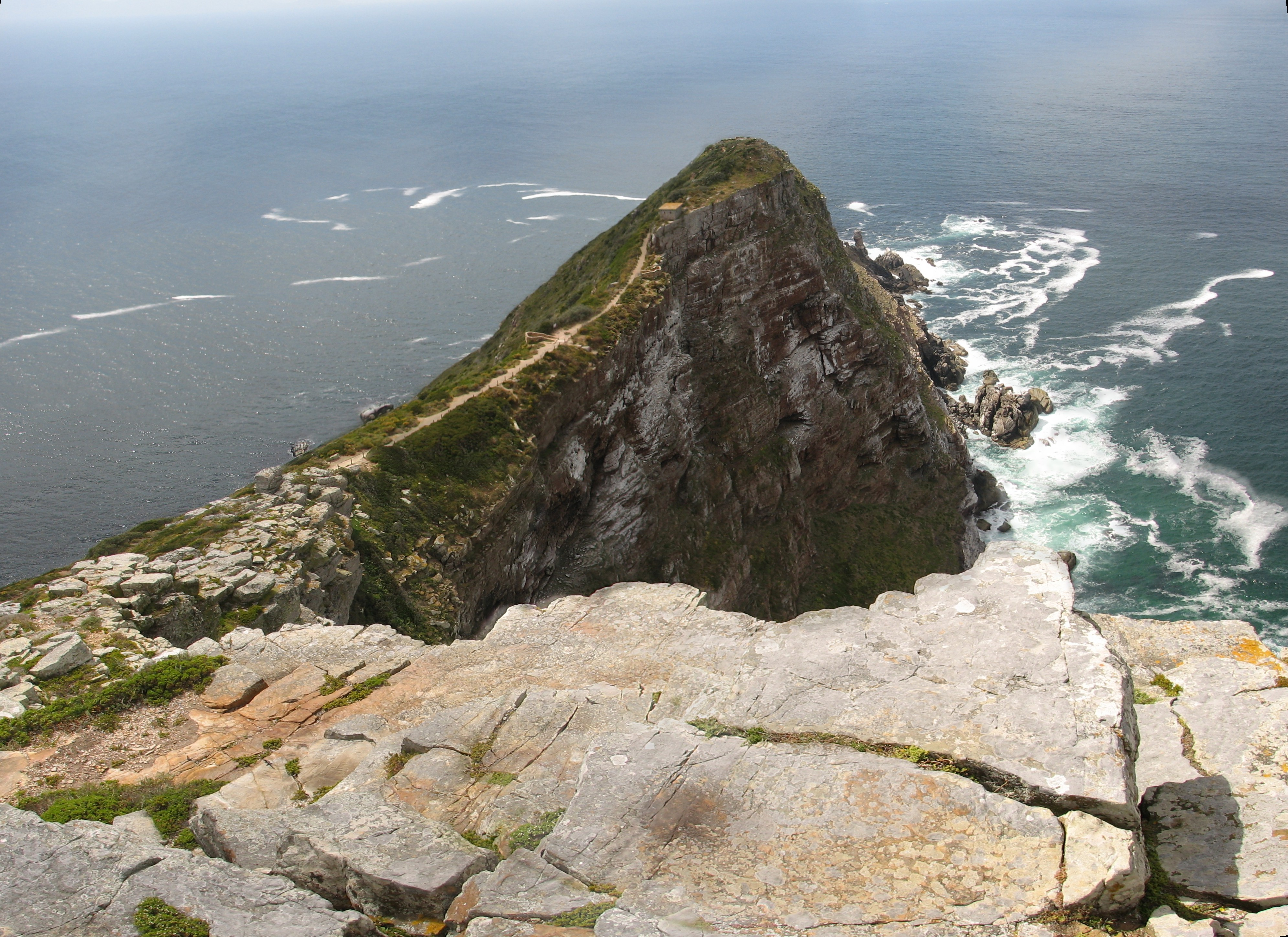 Cape Point This panoramic image was created with Autostitch. Stitched images may differ from reality.